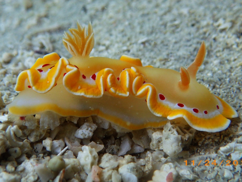 Ardeadoris cruenta, isla Lizard, Australia